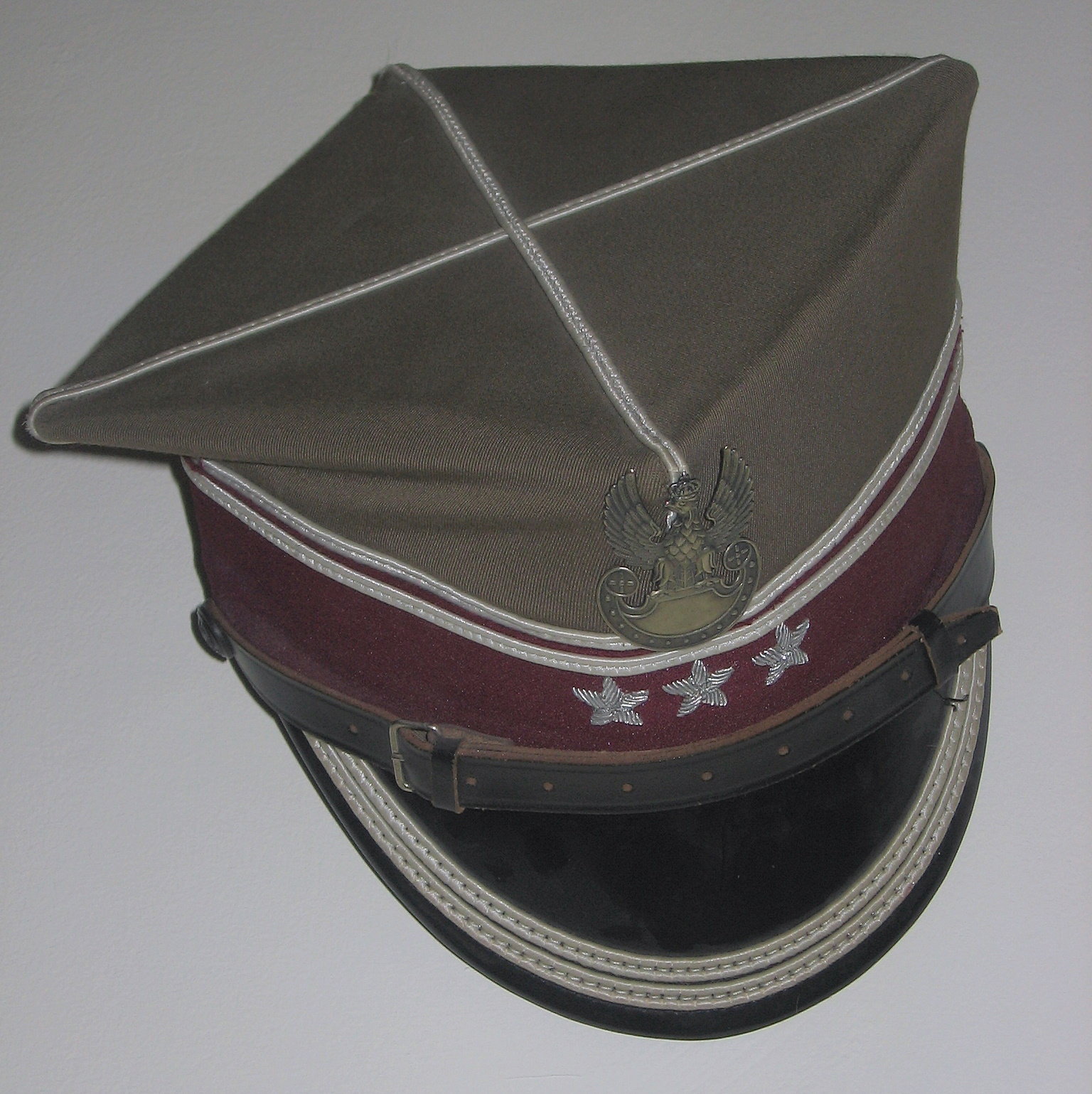 rogatywka lekarza wojskowego w stopniu pułkownika (po reformie mundurowej z lat 90. XX wieku)